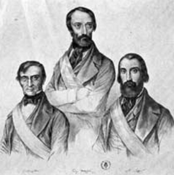 triumvirato composto da Carlo Armellini, Giuseppe Mazzini ed Aurelio Saffi.